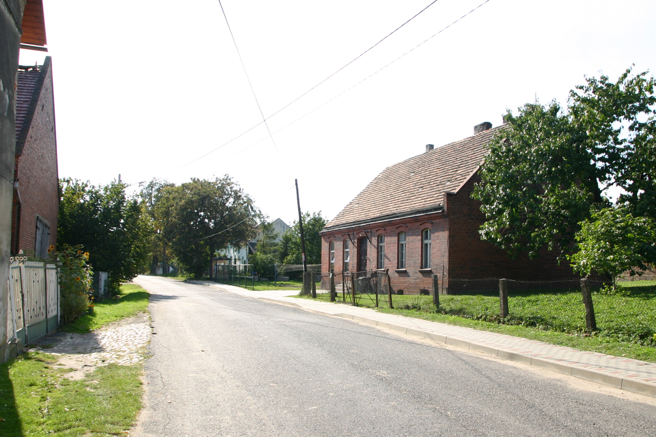 Laskowiec wieś w Polsce położona w województwie opolskim, w powiecie prudnickim, w gminie Biała.